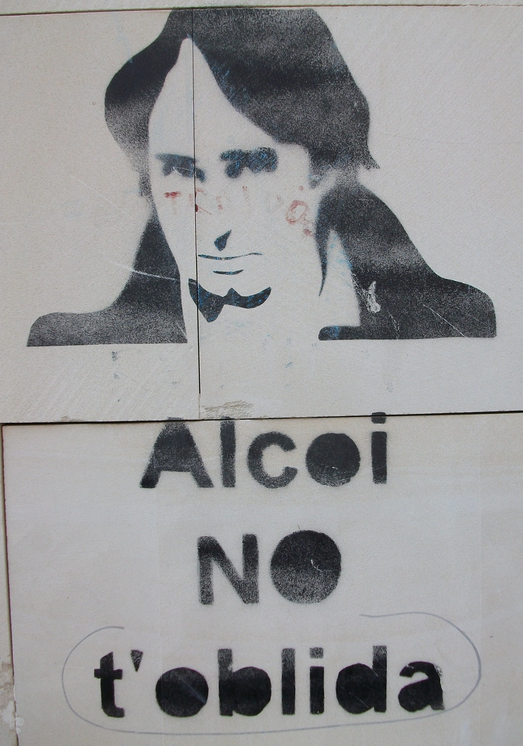 Alcoi no t'oblida, Ovidi Montllor.